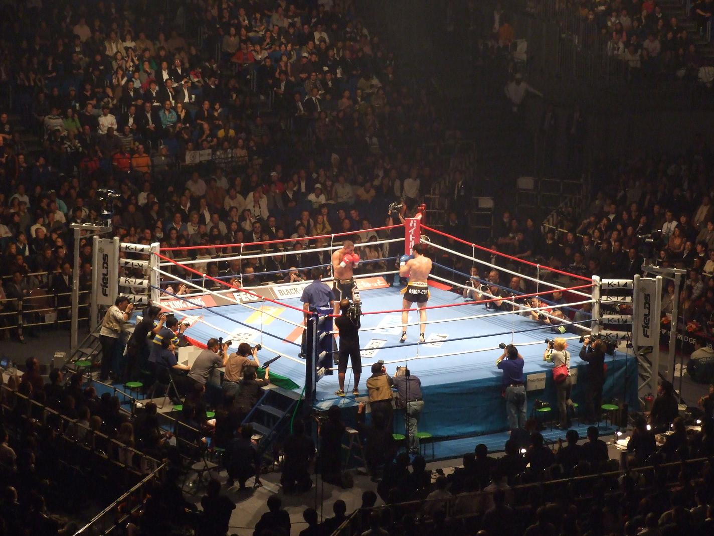 Combate de cuartos de final del World GP Final 2008 entre Saki y Karaev.